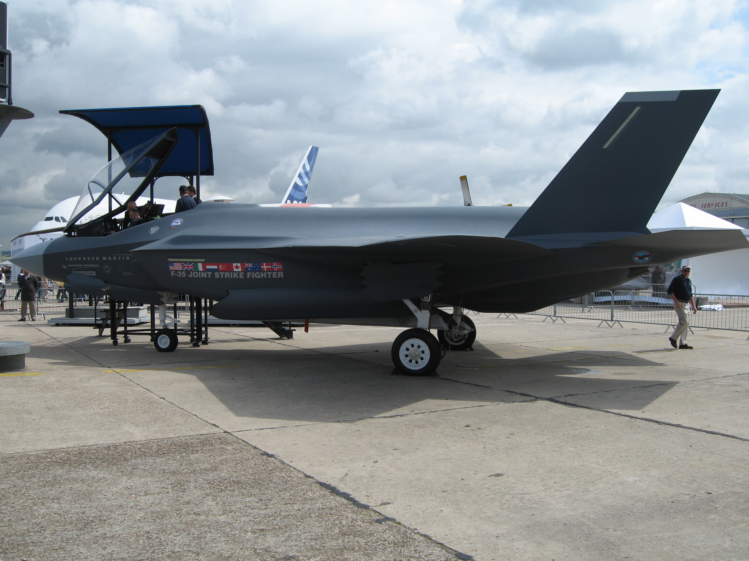 F-35A in Le Bourget, 2007; am Rumpf befindet sich ein Aufdruck der Flaggen der beteiligten Länder: USA, GB, Italien, Niederlande, Türkei, Kanada, Australien, Dänemark, Norwegen.